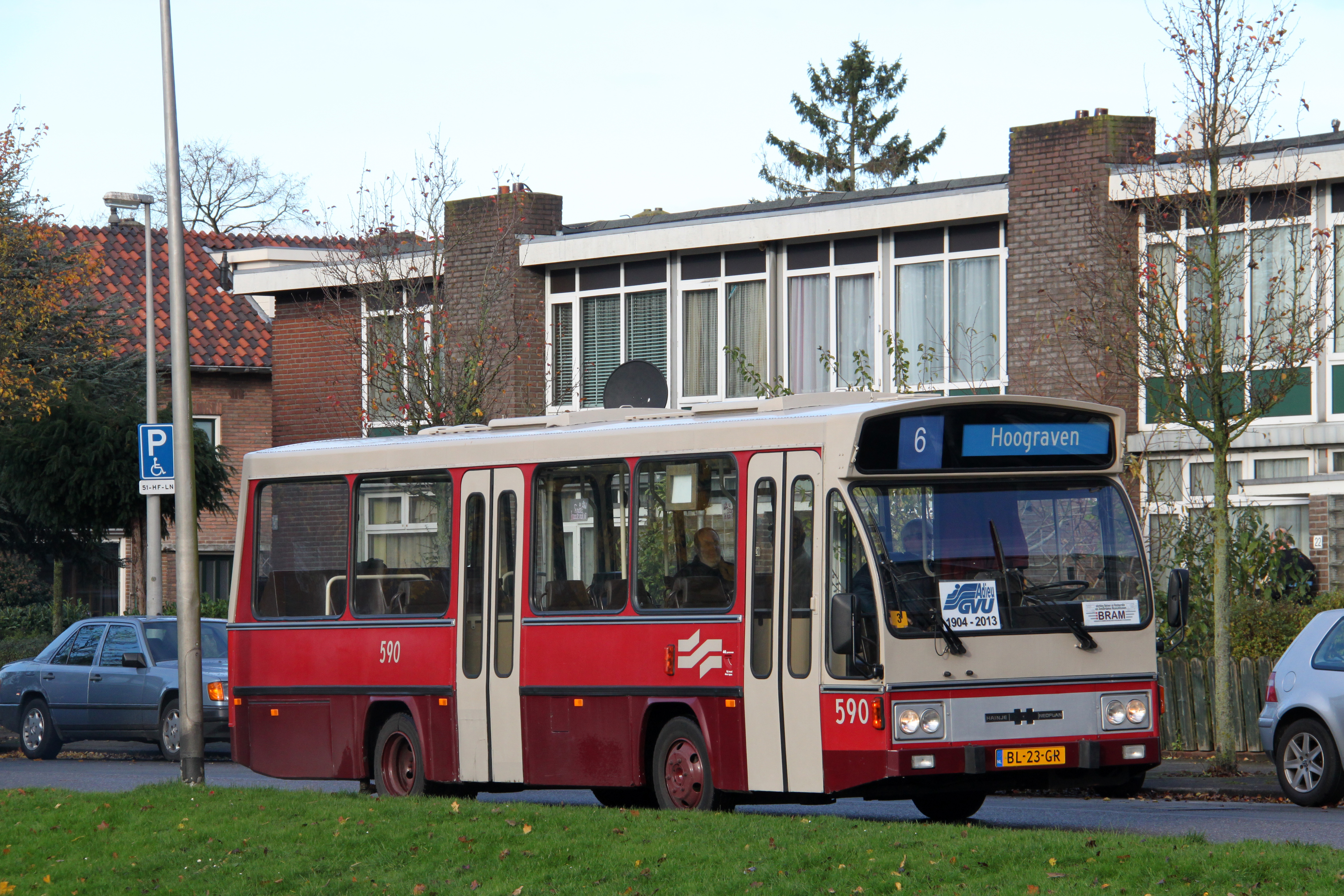 Midi-bus GVB 590 tijdens een afscheidsexcursie in Hoograven, Utrecht.